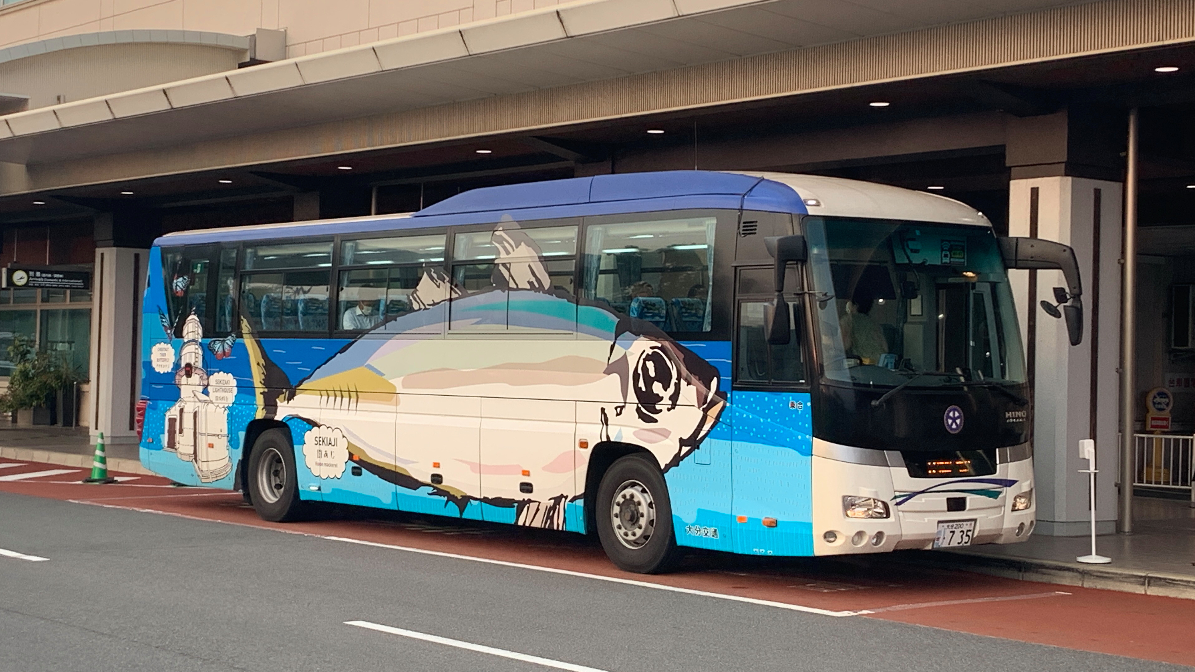 大分交通エアライナー